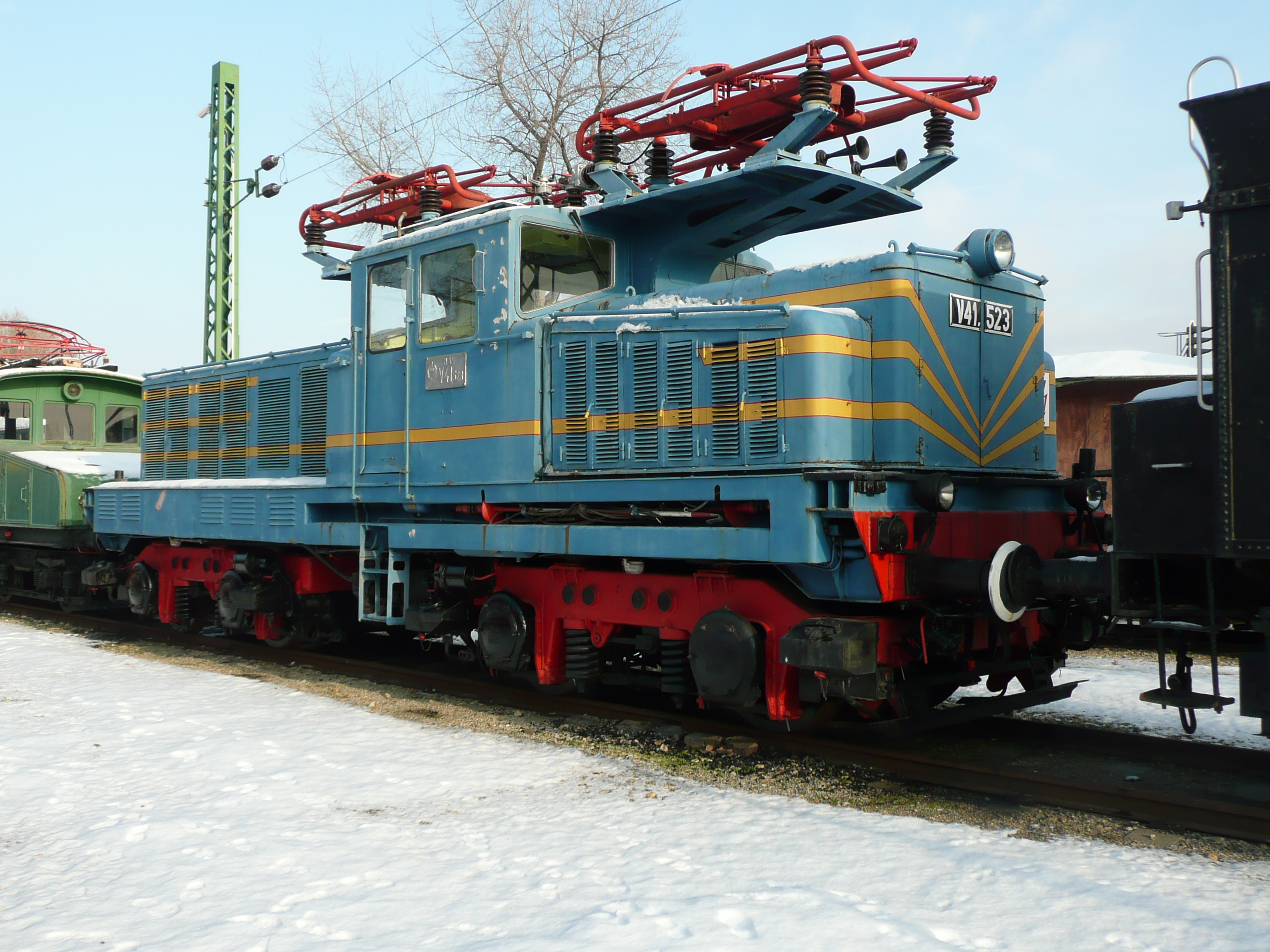 V 41.523 im Bahnpark Budapest